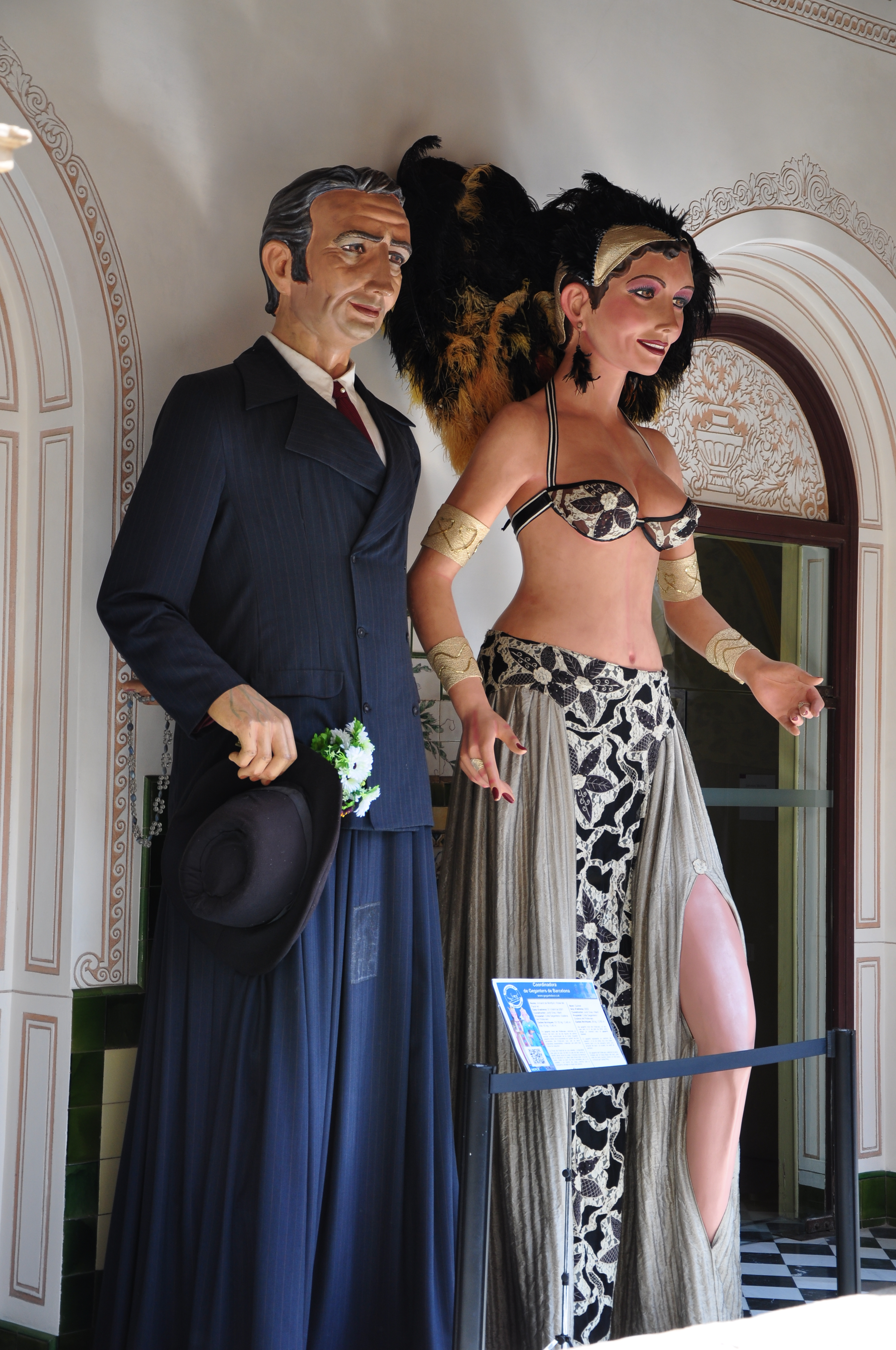 Mercè 2012: Gegants Nous del Poble Sec al pati Manning. L'Armand i la Rosa, com s'anomenen els gegants, són unes figures innovadores i espectaculars amb diverses característiques sorprenents. Ella ès una vedette del Paral.lel, vestida amb roba més aviat escasa i lluènt unes vistoses plomes; tè l'originalitat que entre el faldelli, tot fent un pas de ball, deixa veure la cuixa. Ell, l'Armand, ès un barceloní ric, client dels cabarets, que a una mà porta flors per la vedette, mentre que a l'altra amaga un regal mès valuós.